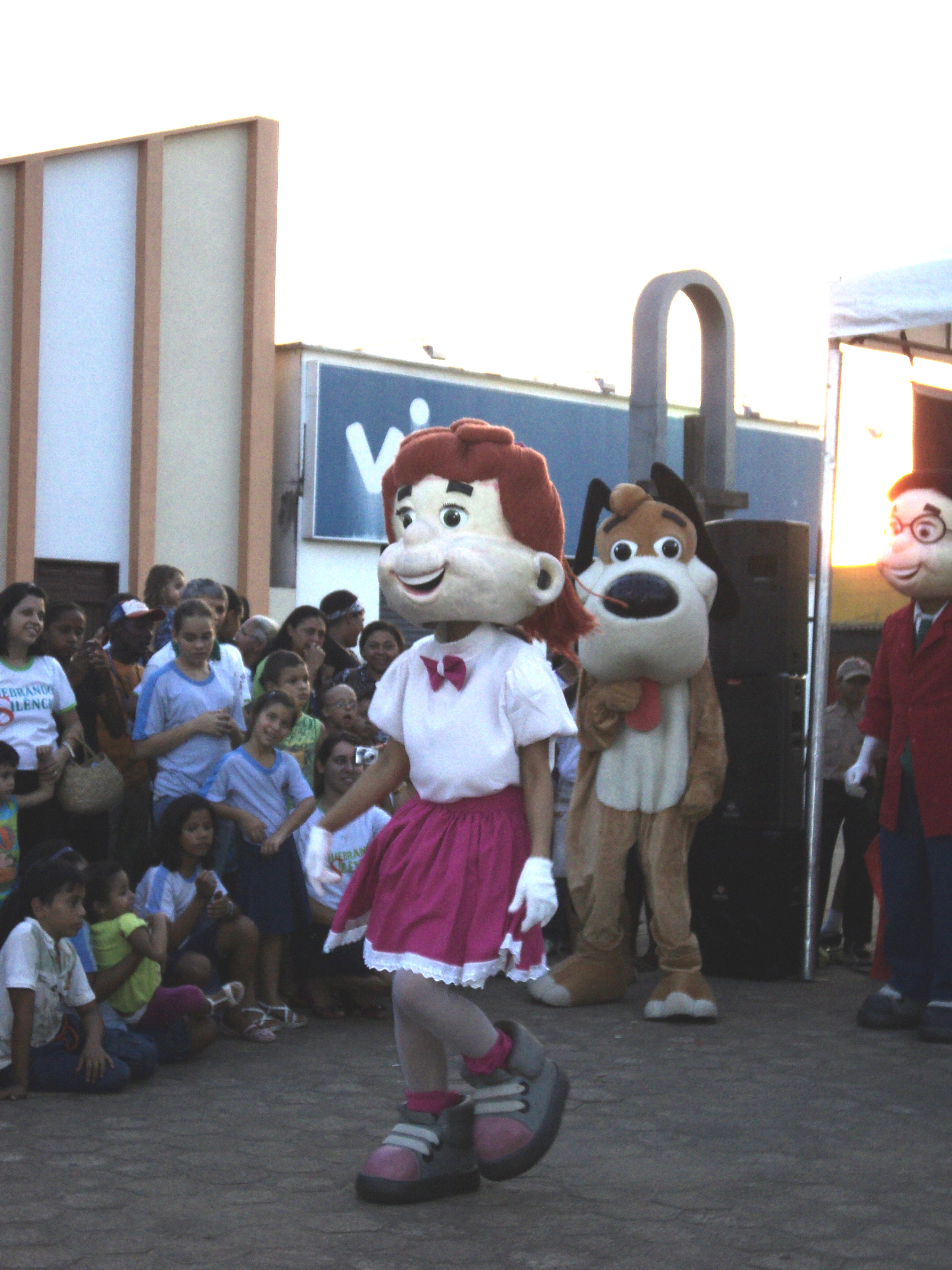 Atores da "Turma Nosso Amiguinho" se apresentando em Marabá